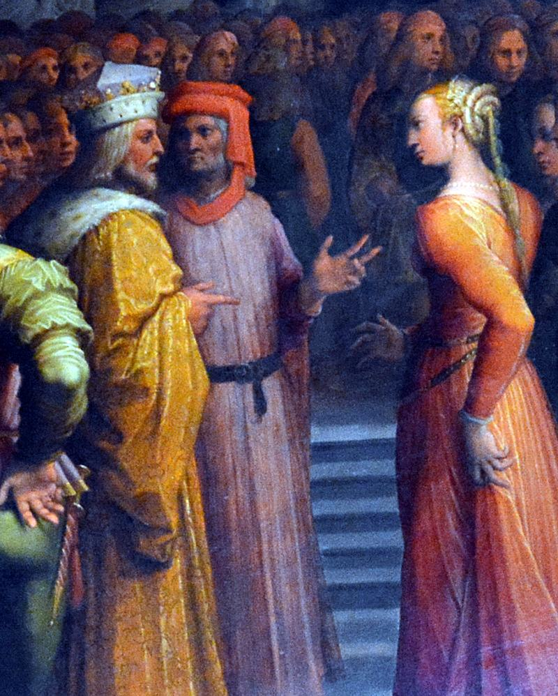 Gualdrada lehnt es ab, Kaiser Otto IV. zu küssen. Detail eines Deckengemäldes im Palazzo Vecchio in Florenz